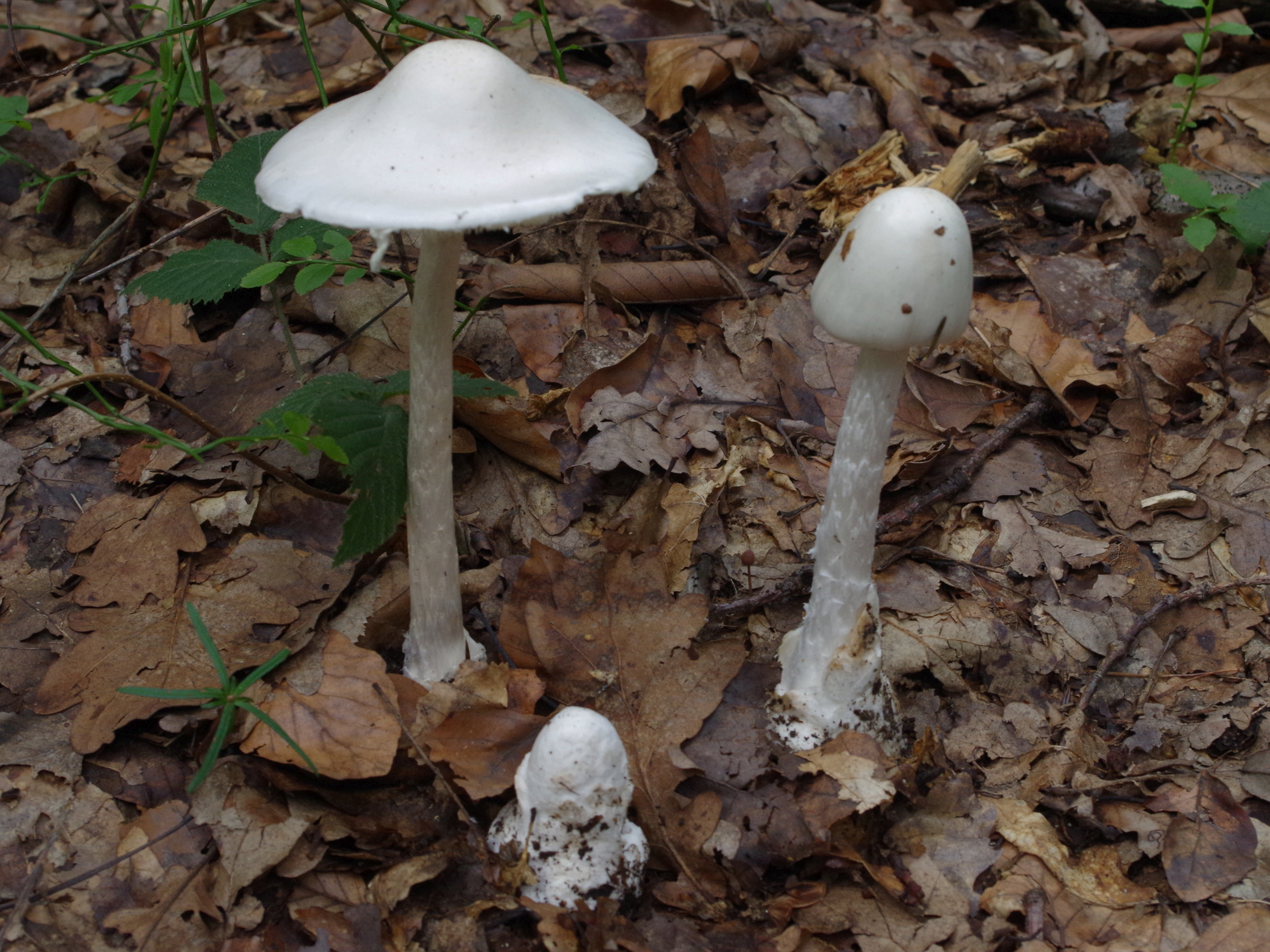 Amanita virosa